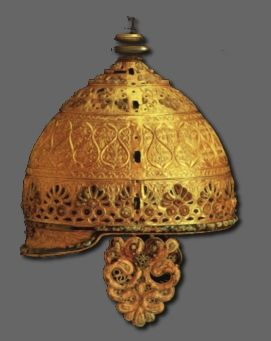 Casque celte d'apparat en fer, bronze, or, argent et corail. IVe a.J.C. Découvert à Agris, en Charente et conservé au musée d'Angoulême (IIe âge du fer).